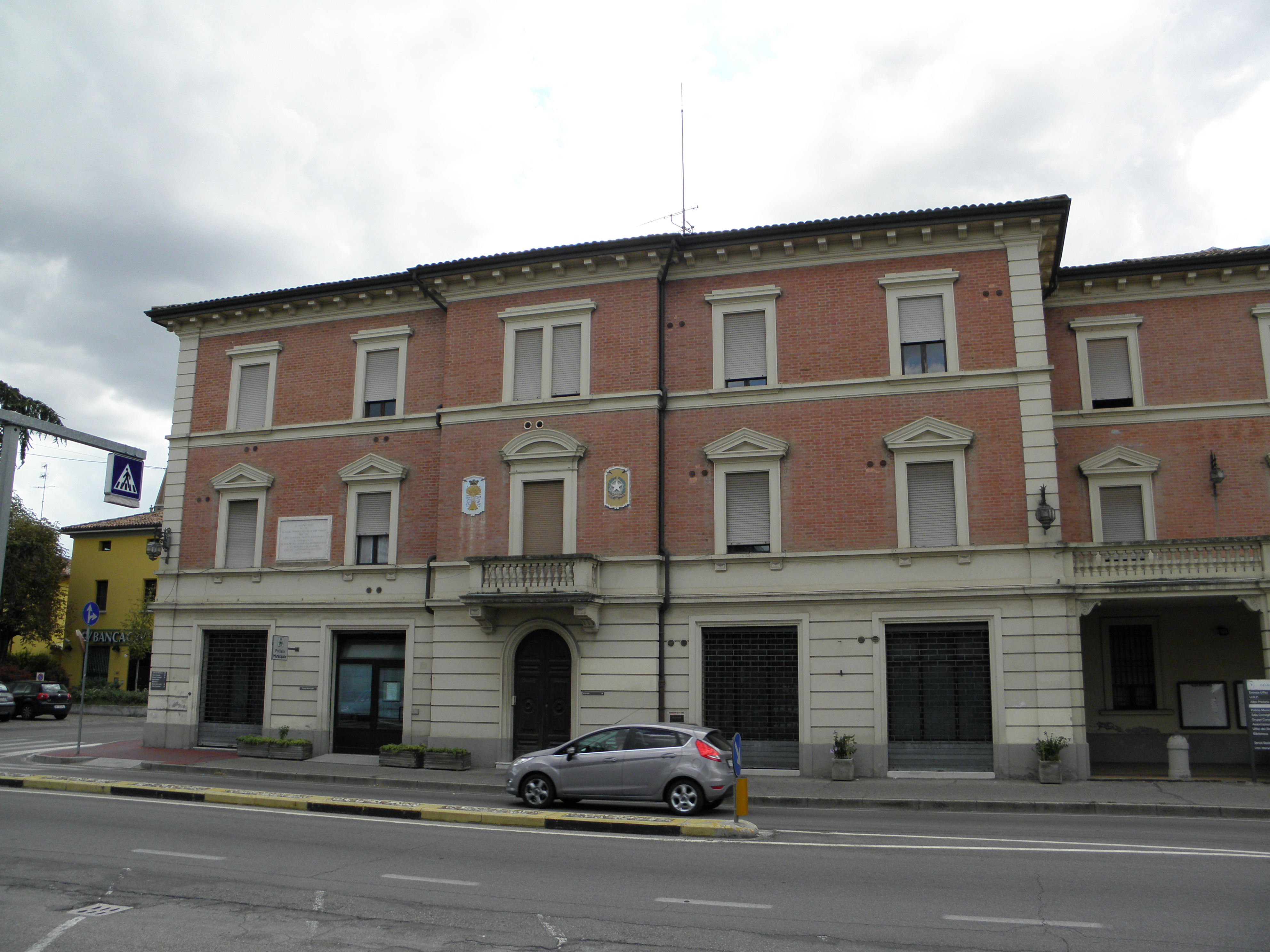 Granarolo dell'Emilia: il Palazzo Municipale.